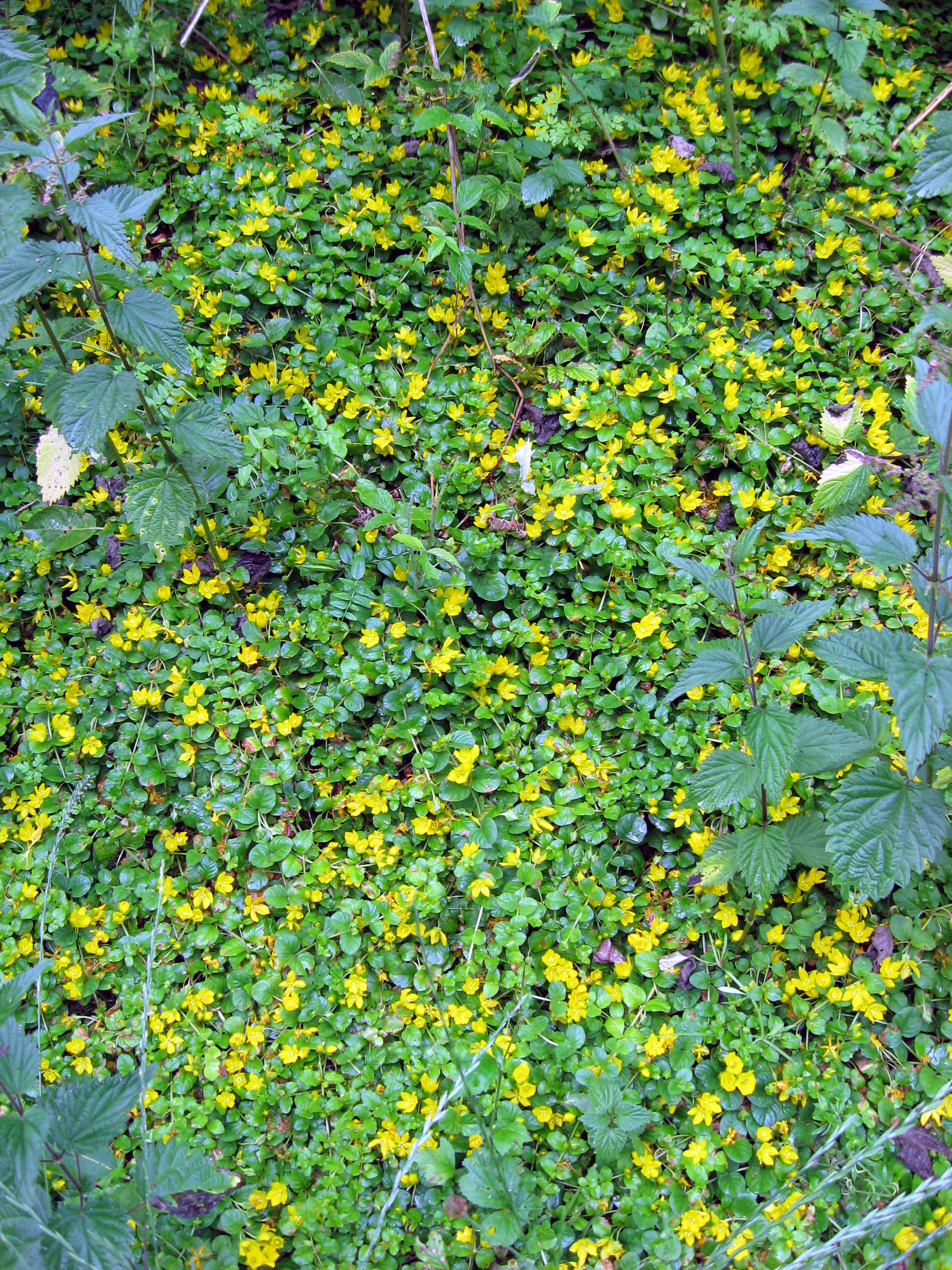 Lysimachia nummularia - vrbina penízková ,foto Podkomorské lesy Česká republika, jižní Morava